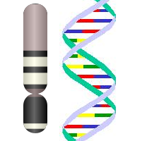 Y chromosome DNA icon